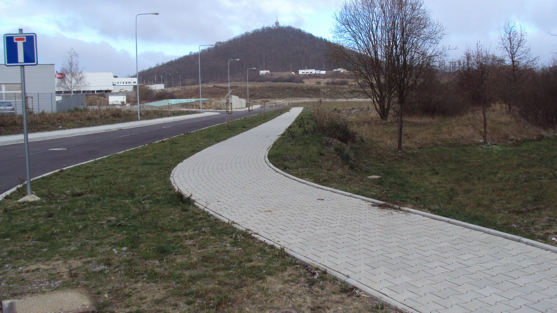 Kopec Špičák nad městem, zimní pohled ze sídliště